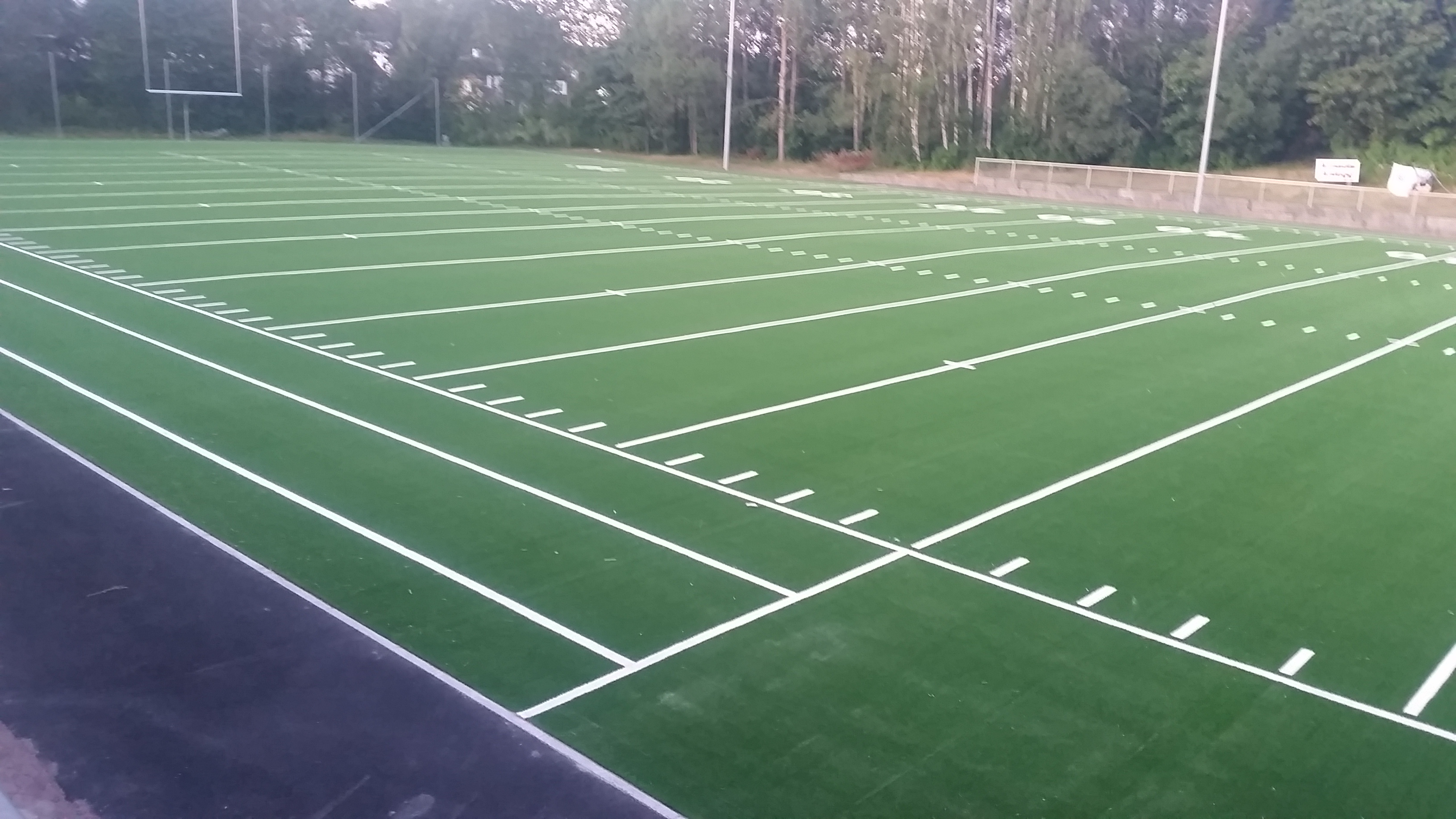 Ny bane